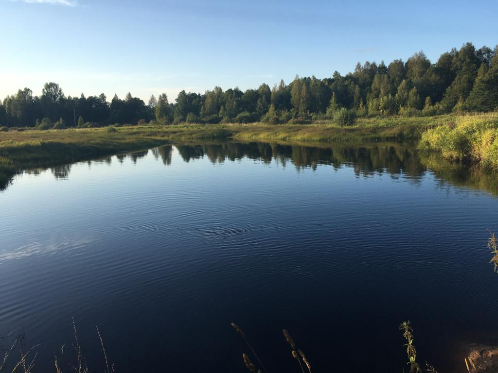 Омут на реке Колоденке в окрестностях деревни Бузаково